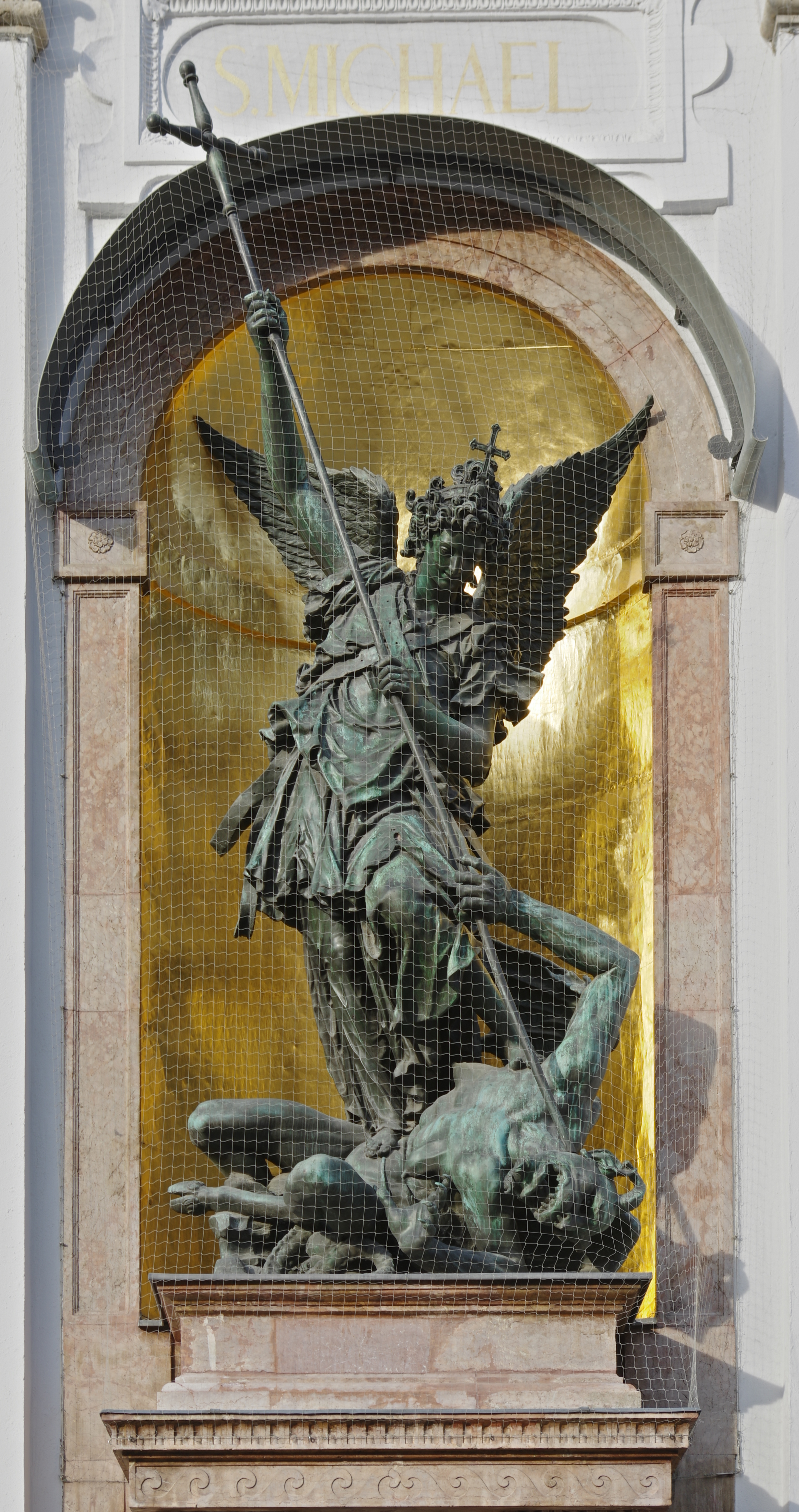 München, Neuhauser Straße 2, Augustinerkirche; Akten-Nr.D-1-62-000-4719